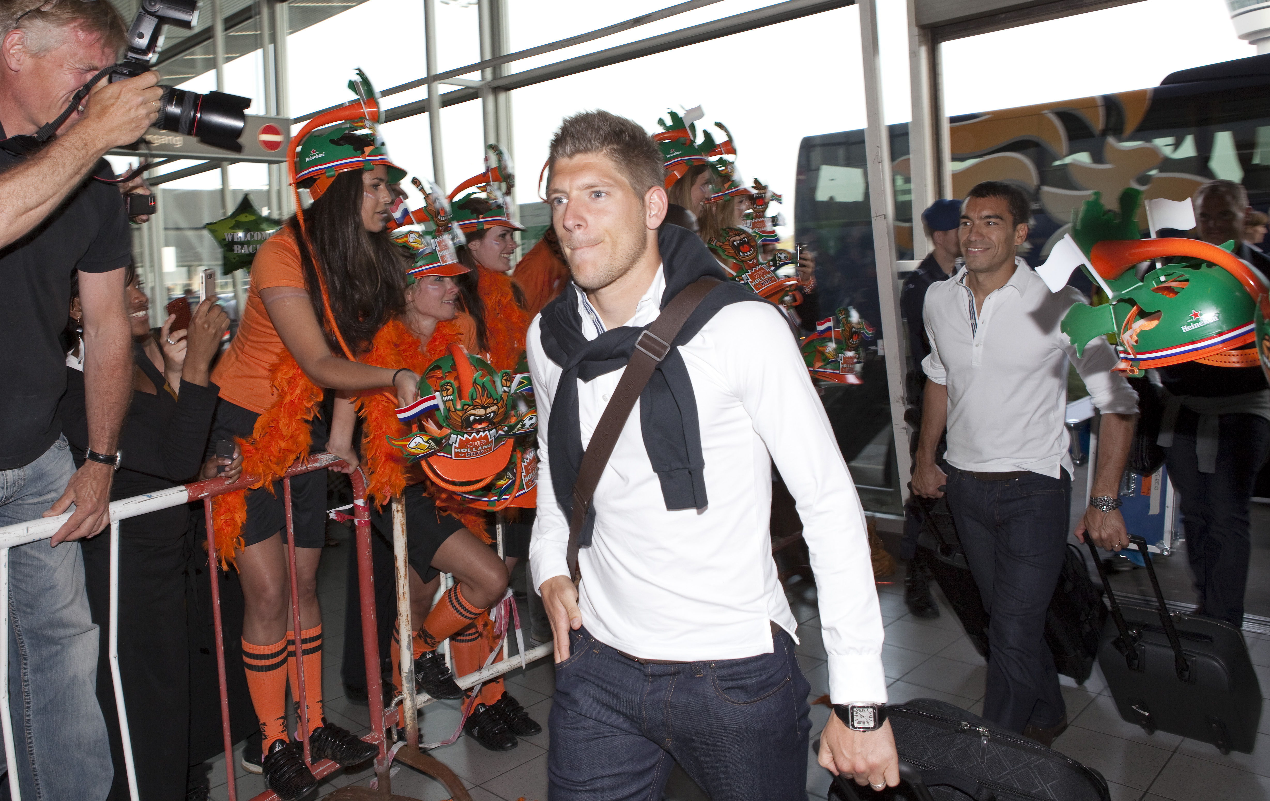 Stijn Schaars